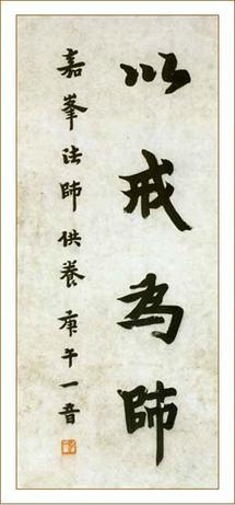 中文（中国大陆）: 以戒为师，为弘一法师（1942年去世）墨宝，根据《中华人民共和国版权法》或《中华民国版权法》，已经进入公有领域（作者去世加50年）；根据美国版权法规，该图于1996年1月1日時在来源国處於公共領域，故在美国也属于公有领域